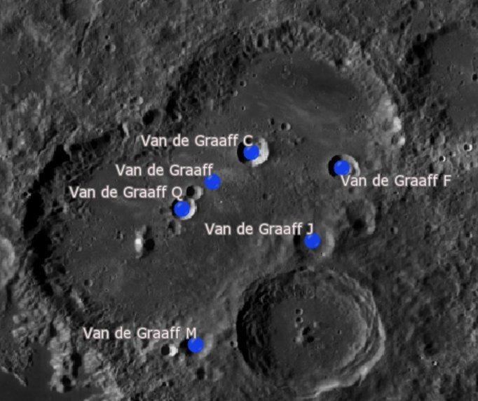 Cráter lunar Van de Graaff. Cráteres satélite. (Imagen LRO)